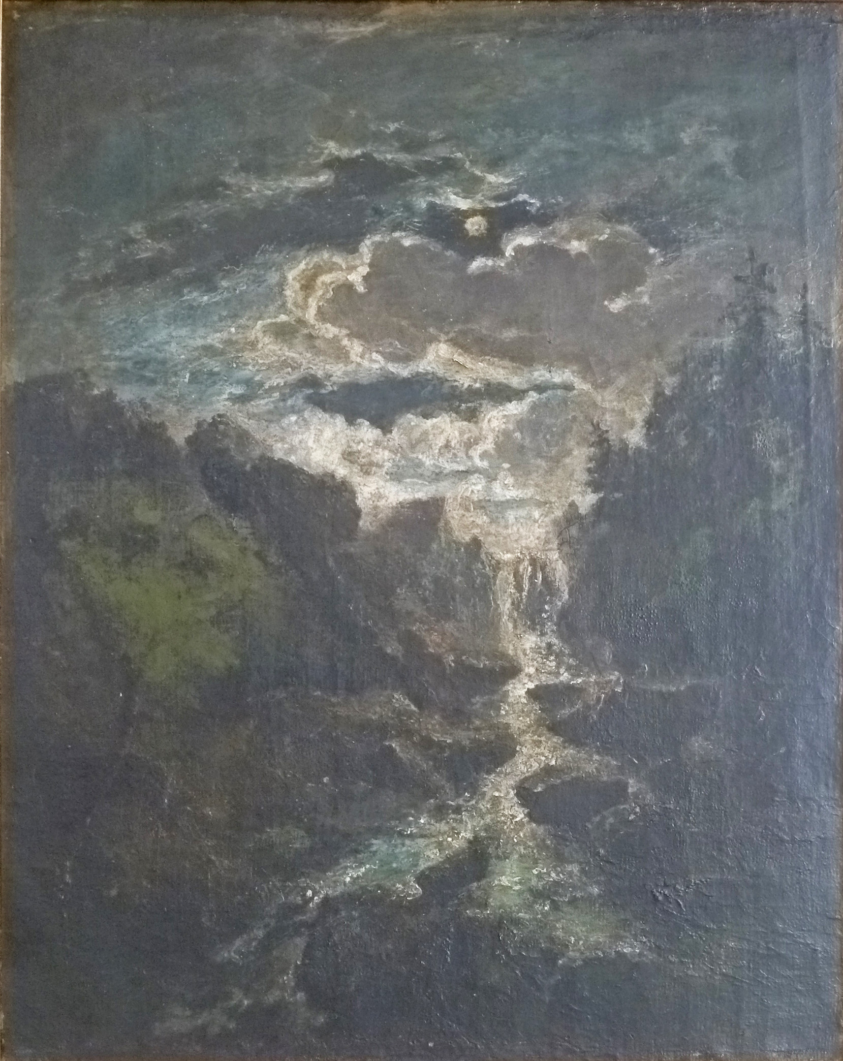 "Waterval bij maanlicht", olieverf op doek 86 x 65 cm door de Belgische kunstschilder Théodore Baron (1840-1899); privé-collectie